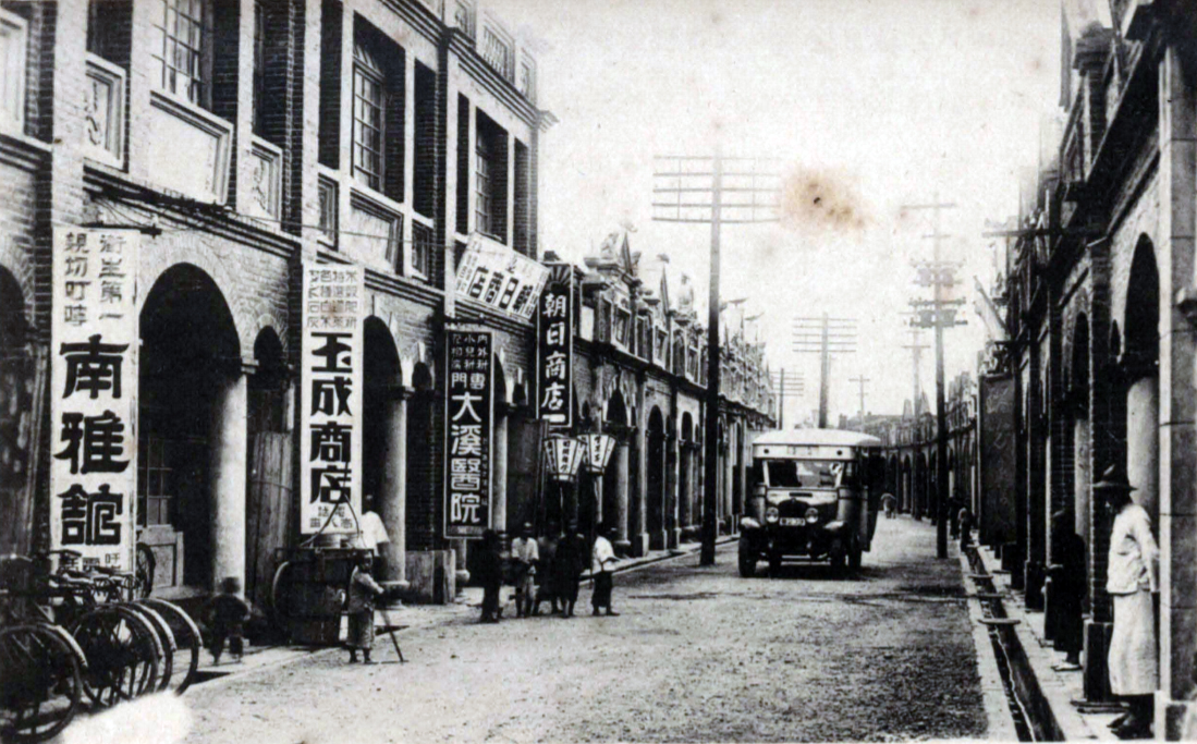 中文（台灣）: 日治時期大溪街景